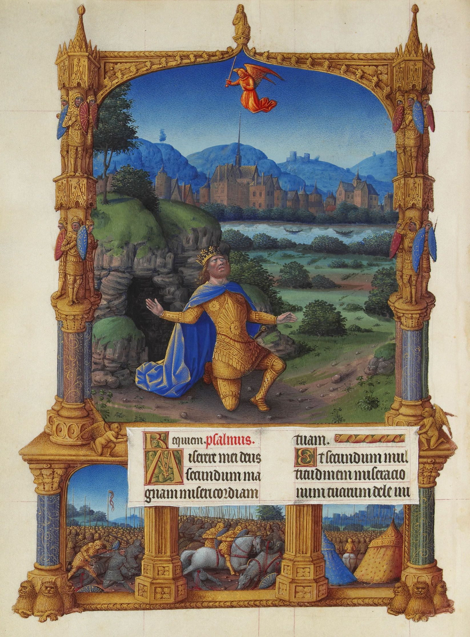 David en armure, agenouillé devant une grotte dans un paysage et réclamant la miséricorde. Trois scènes de batailles en bas de l'image.